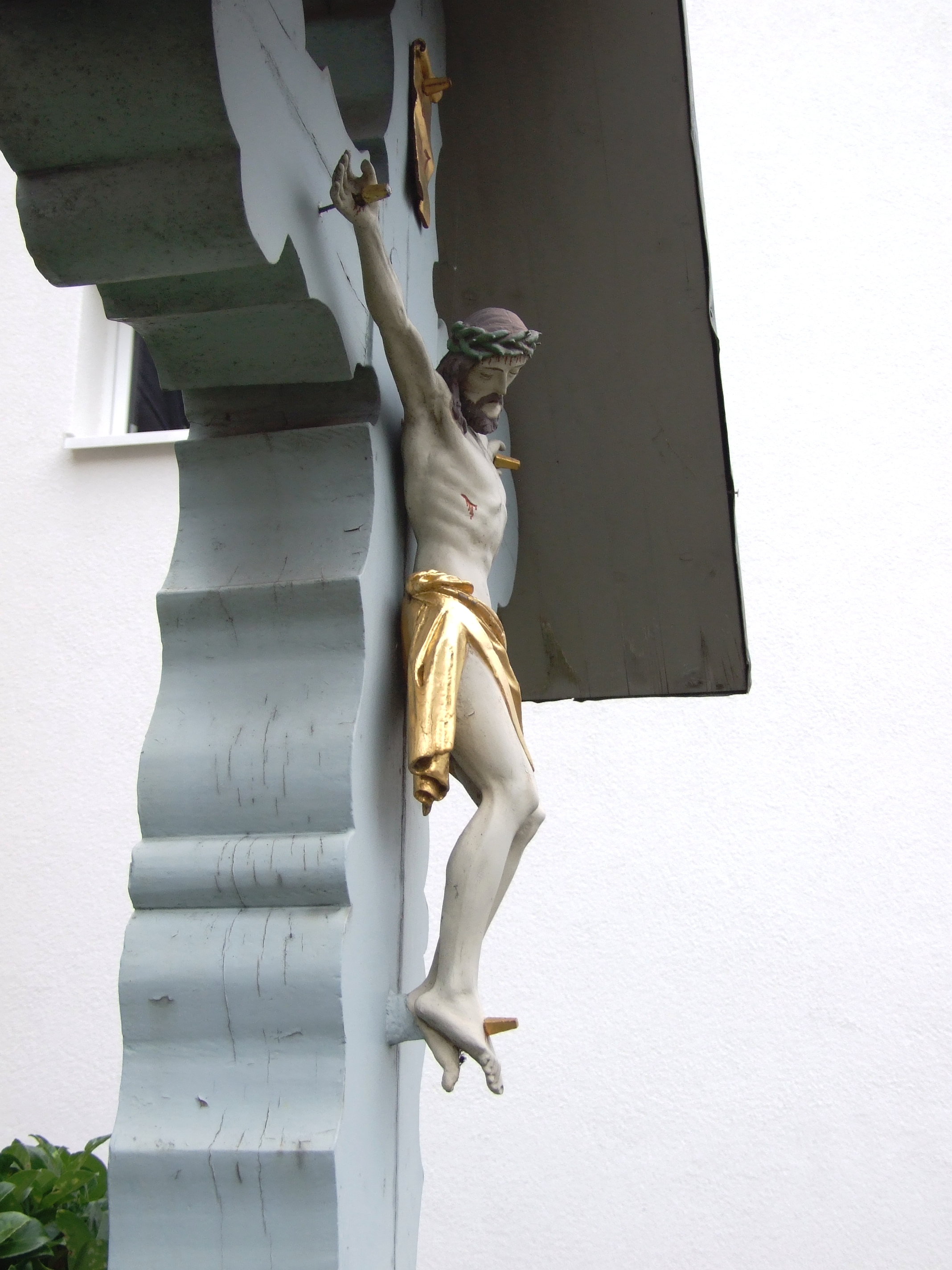 Bergisch Gladbach, Denkmal Nr. 96, Detail